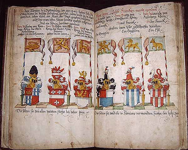 Die Darstellung einiger Turniergesellschaften im Turnierbuch der Familie von Gemmingen-Hornberg, Archiv Burg Hornberg.